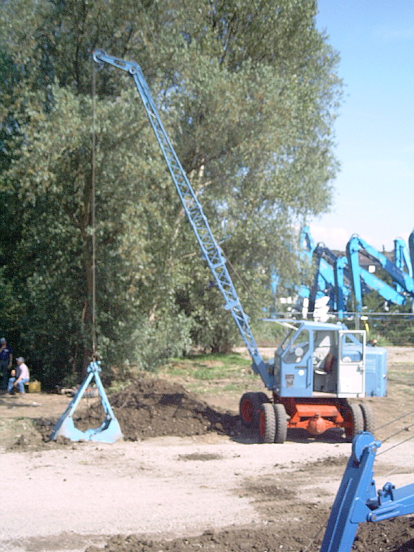 Fuchs Bagger beim 50. Jubiläum des Herstellers in Bad Schönborn